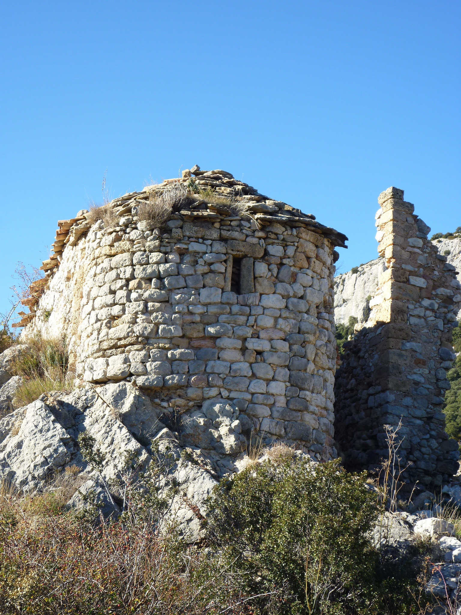 Castell de Cambrils (Odèn): Absis de la capella de la Mare de Déu del Remei